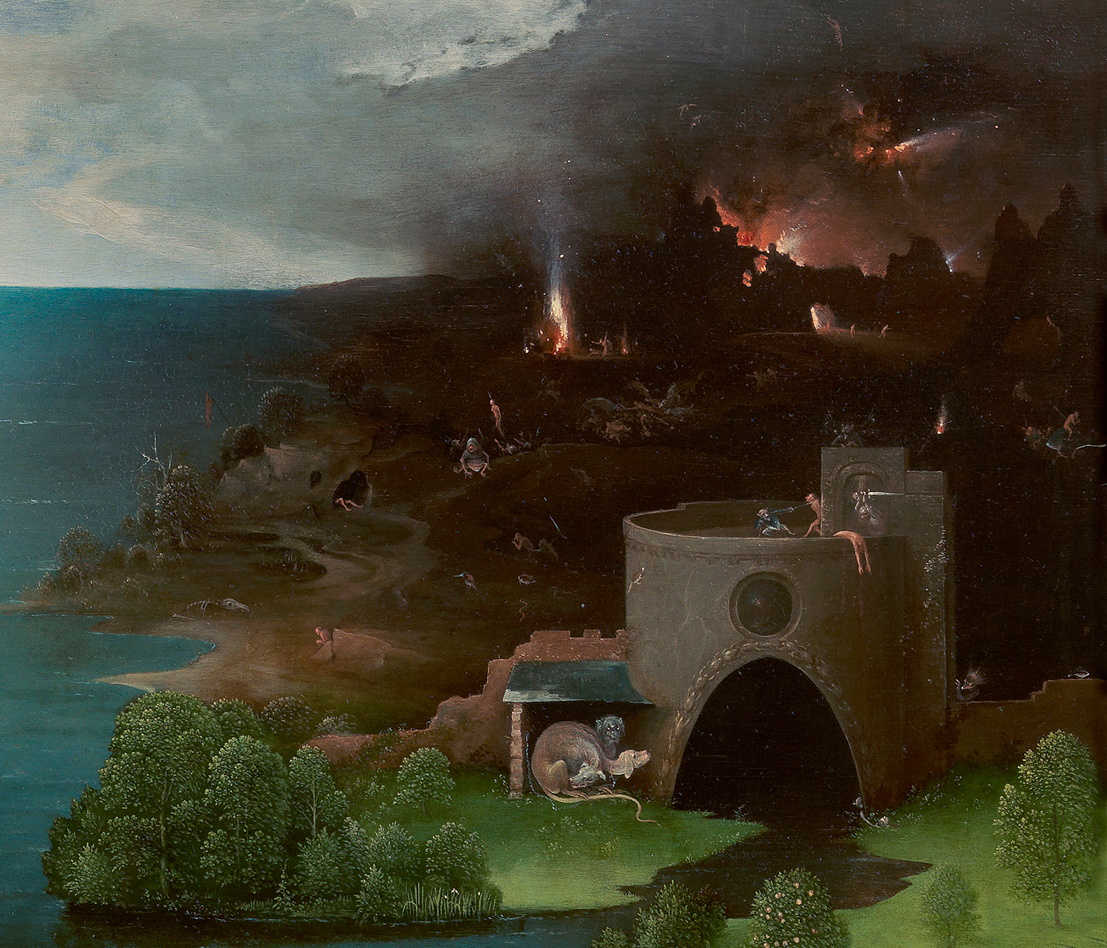 Joachim Patinier, Passage du Styx, détail : l'enfer